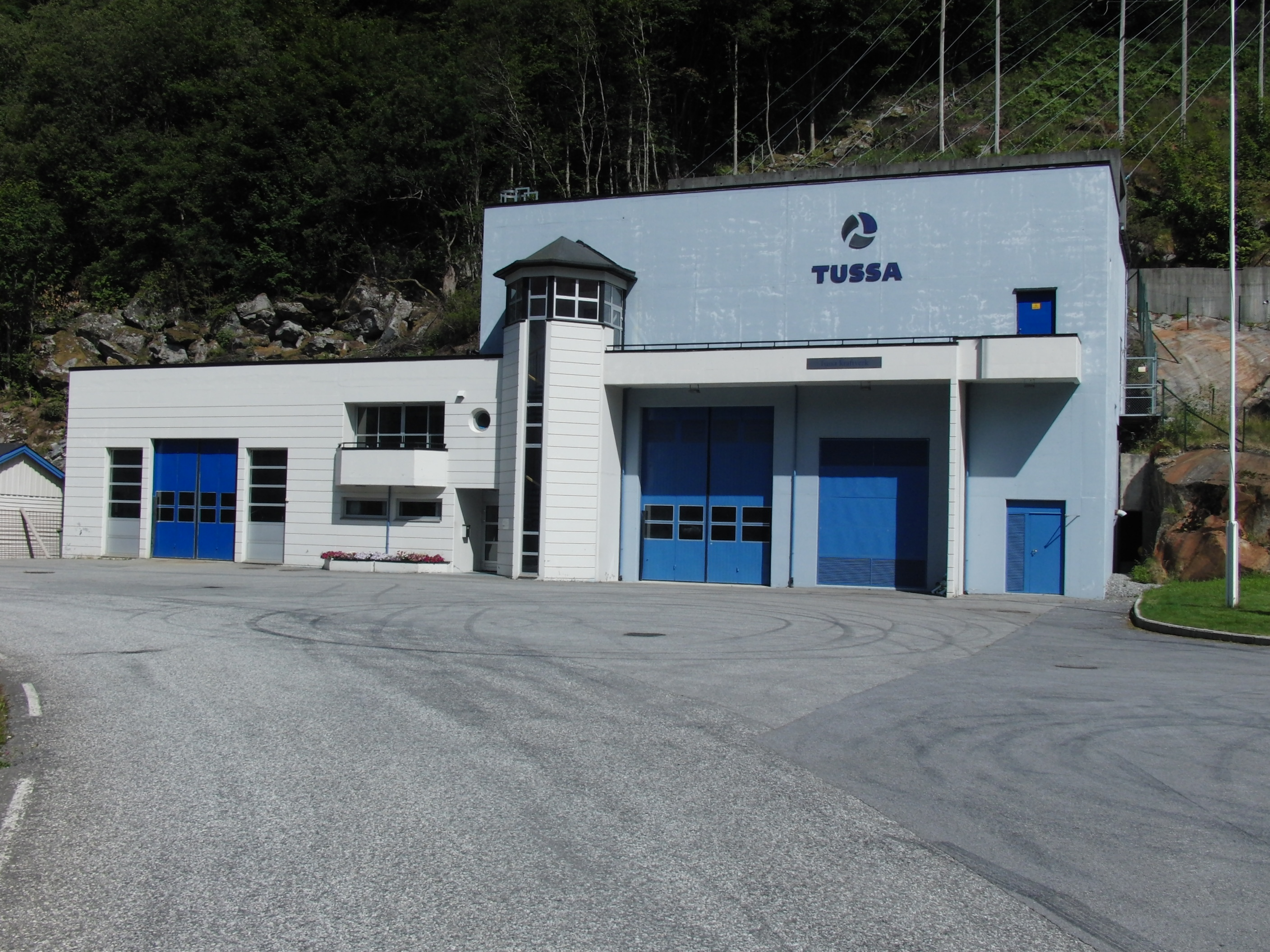 Tussa kraftverk